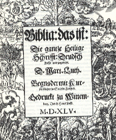 Titelseite der ersten Lutherbibel